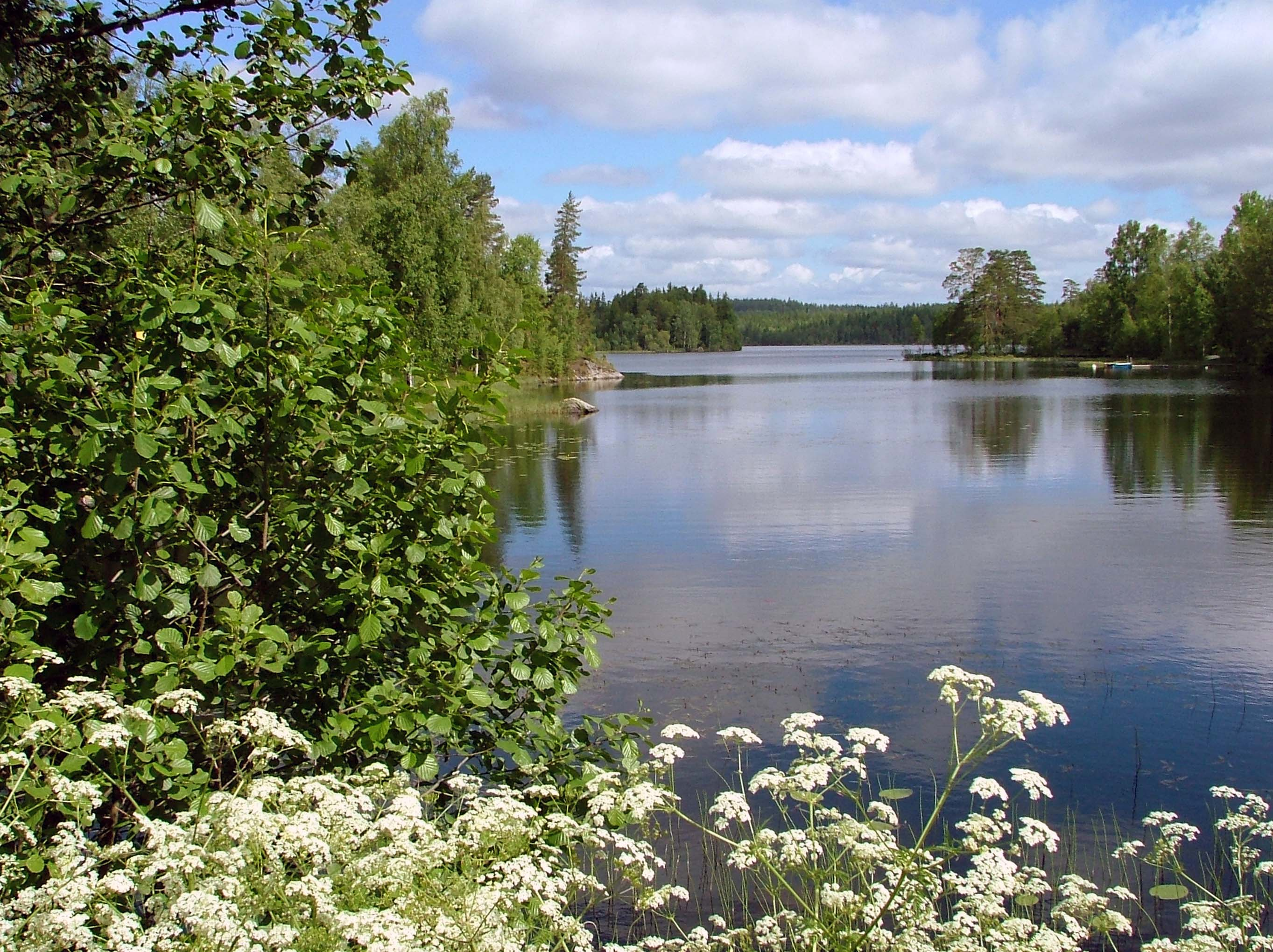 Boskvarnasjön,Småland